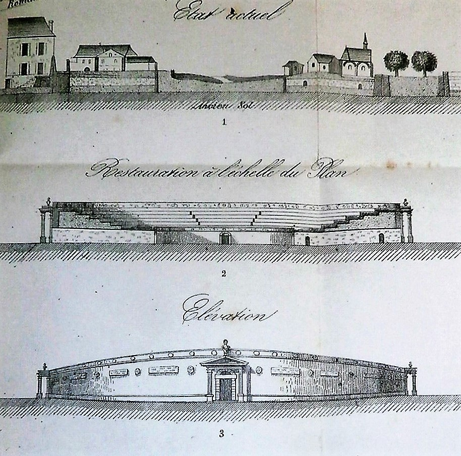 Restitution de l'amphithéâtre à l'issue des fouilles de 1853